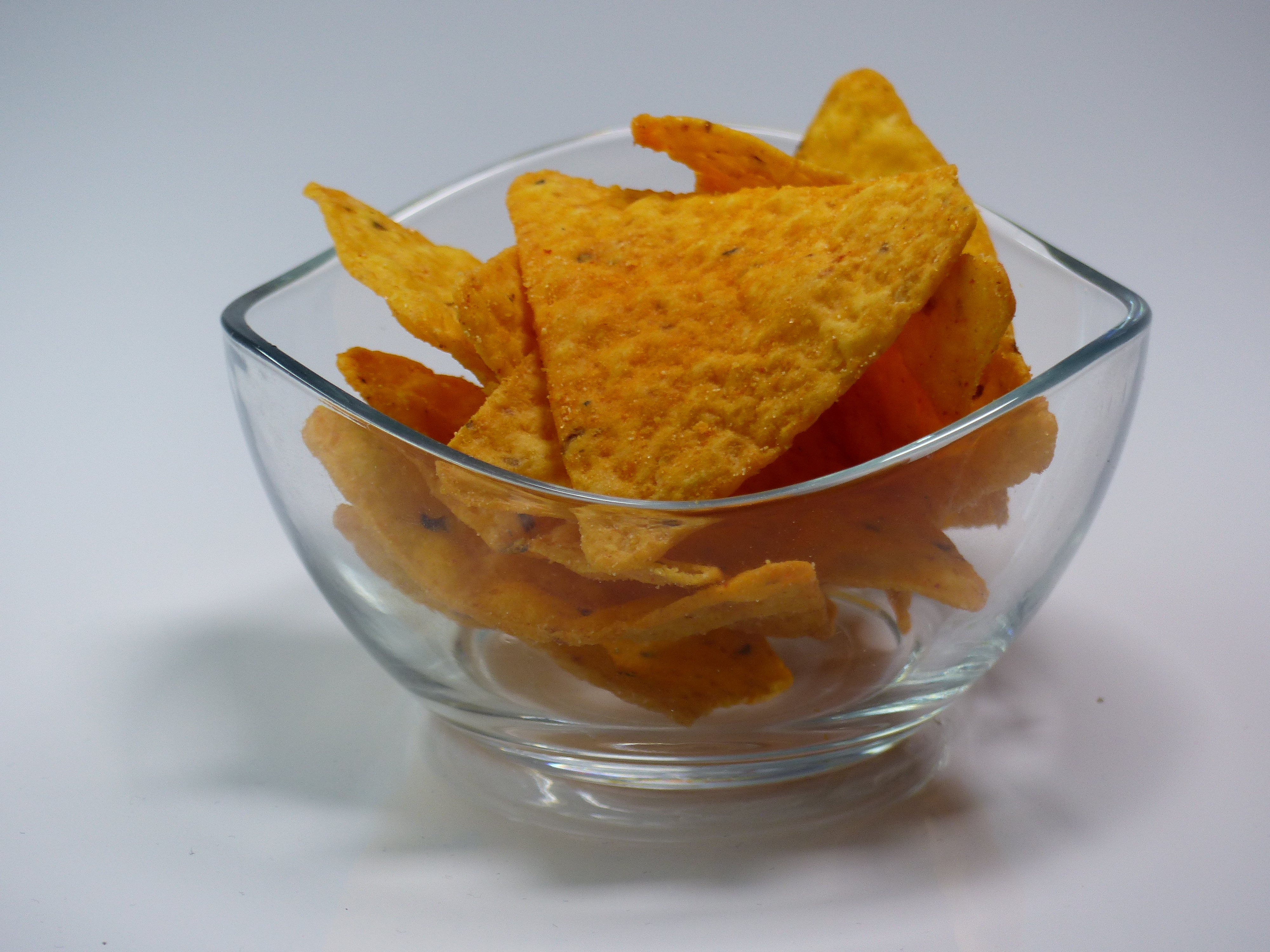 Snaks de maíz con aroma a queso